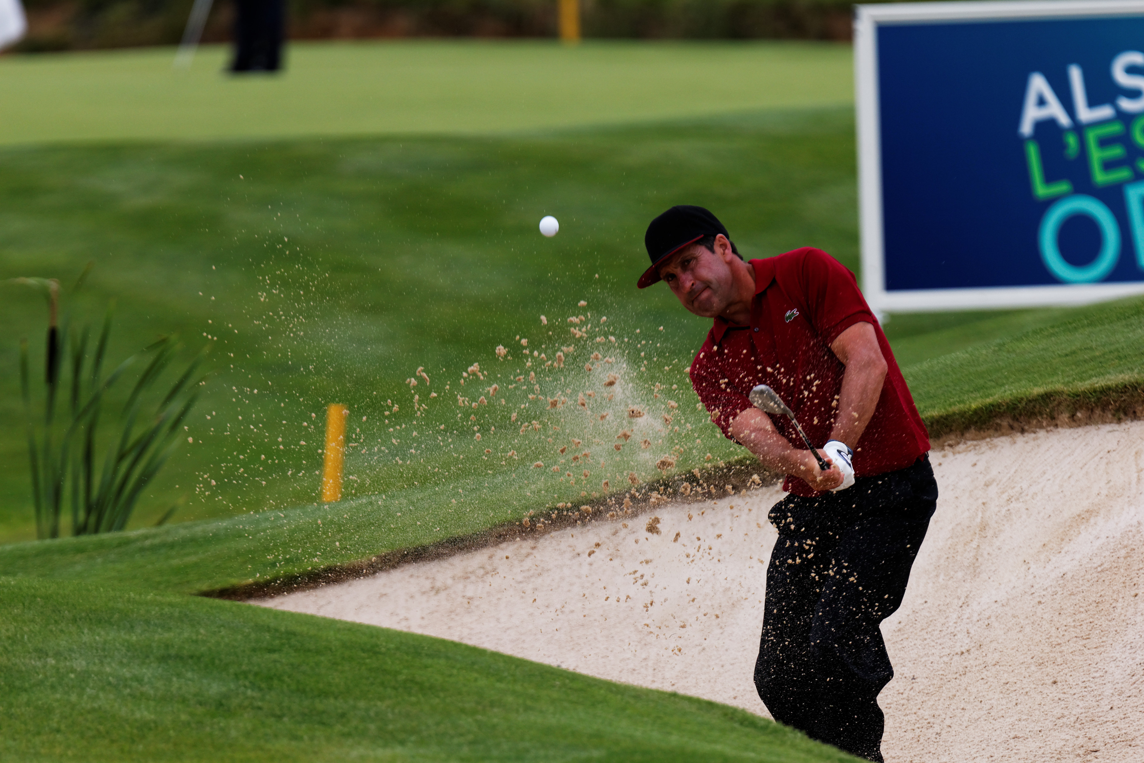 José Maria Olazabal lors de l'Open de France de golf 2014, dans le bunker du green du 18, Golf de St Quentin en Yvelines